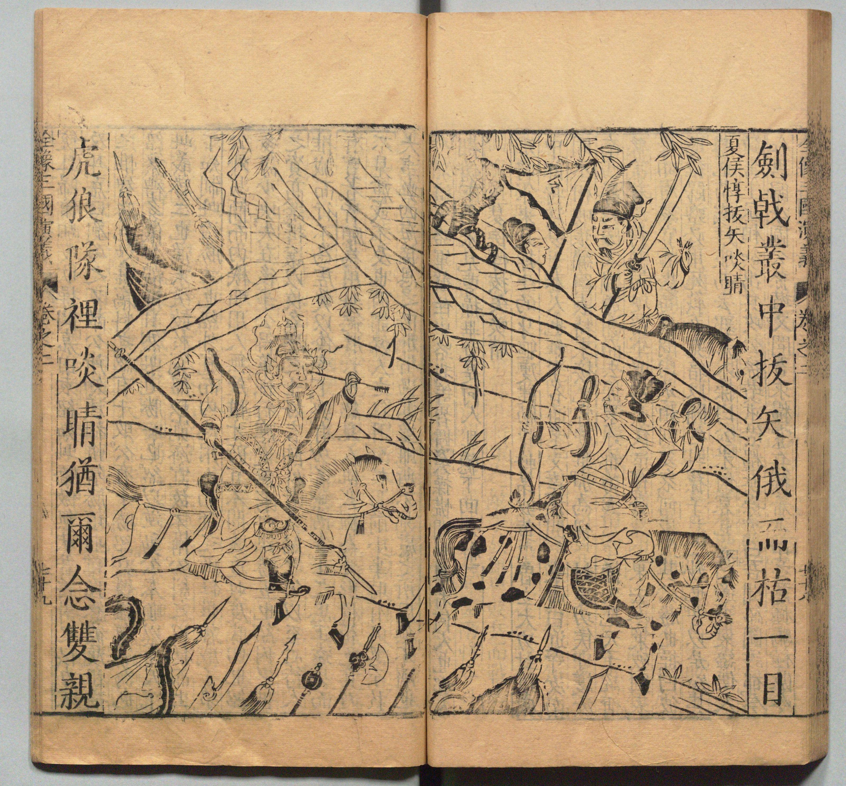 《新刊校正古本大字音释三国志通俗演义》 明万历十九年书林周曰校刊本